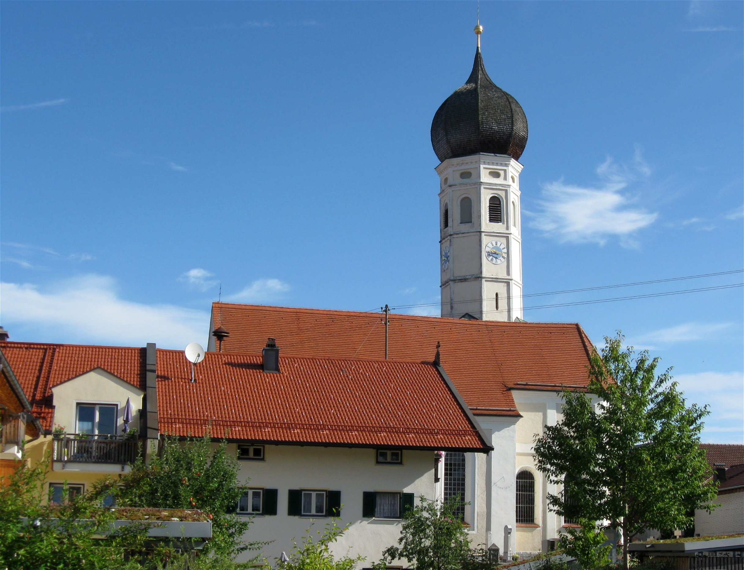 Kath. Kirche St. Andreas; stattlicher Barockbau, 1687, Turmunterteil spätmittelalterlich; mit Ausstattung.